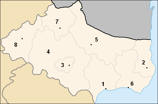 Sujet : carte des obchtini (municipalités) de l'oblast de Dobritch, en Bulgarie Auteurs : Потребител:Ljubo (Любомир Таушанов = Lyoubomir Taouchanov), pour la version originale en bulgare, Utilisateur:Hégésippe Cormier, pour la translittération française Source : Картинка:Dobric Oblast map.PNG (20 mai 2005) Licence